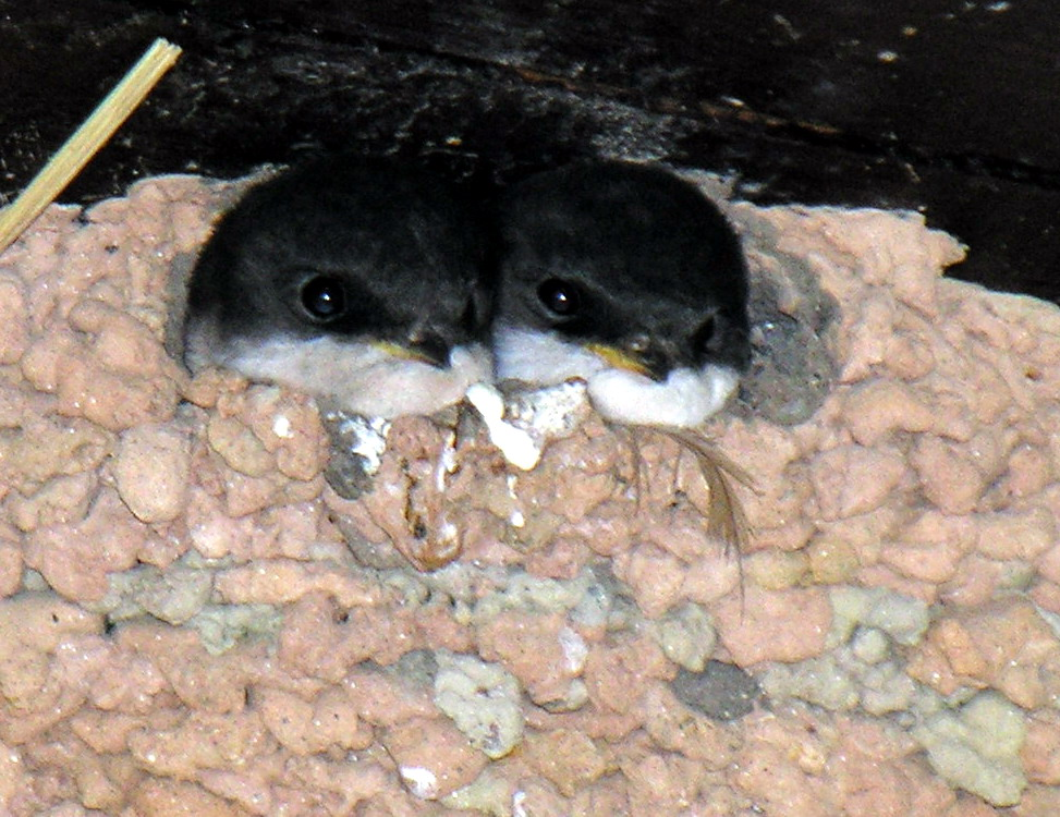 Langinė kregždė (Delichon urbica), 2 juv. Šeima. Kregždiniai (Hirundinidae) Foto: Algirdas, 2006 m. rugpjūčio 10 d., Lietuva